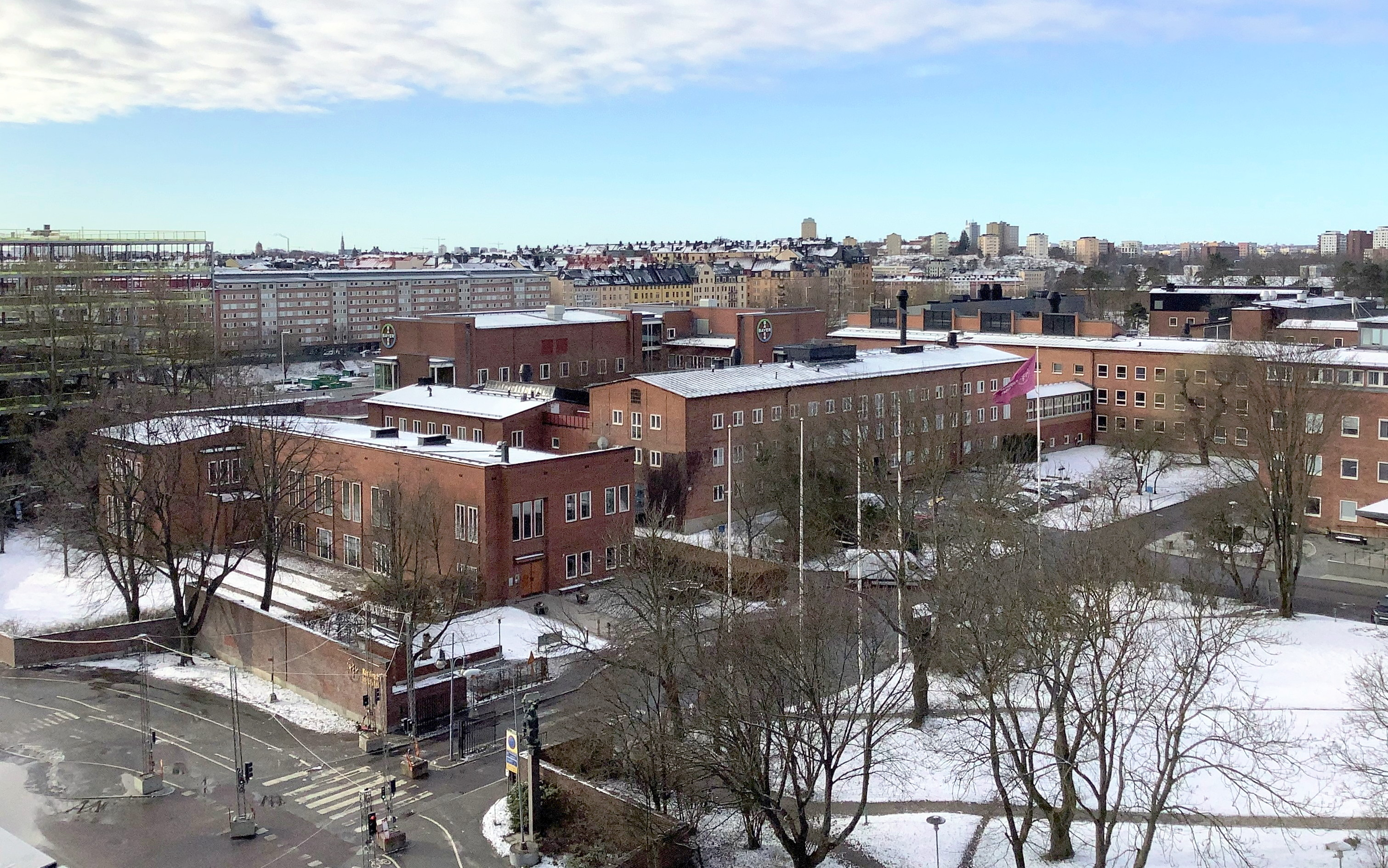 Del av Campus Solna, Karolinska Institutet